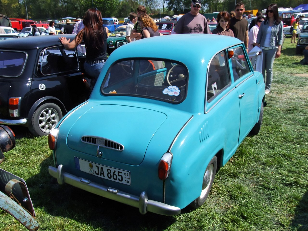 Quelle: selbst fotografiert, 04/2007 Fotograf: Späth Chr.